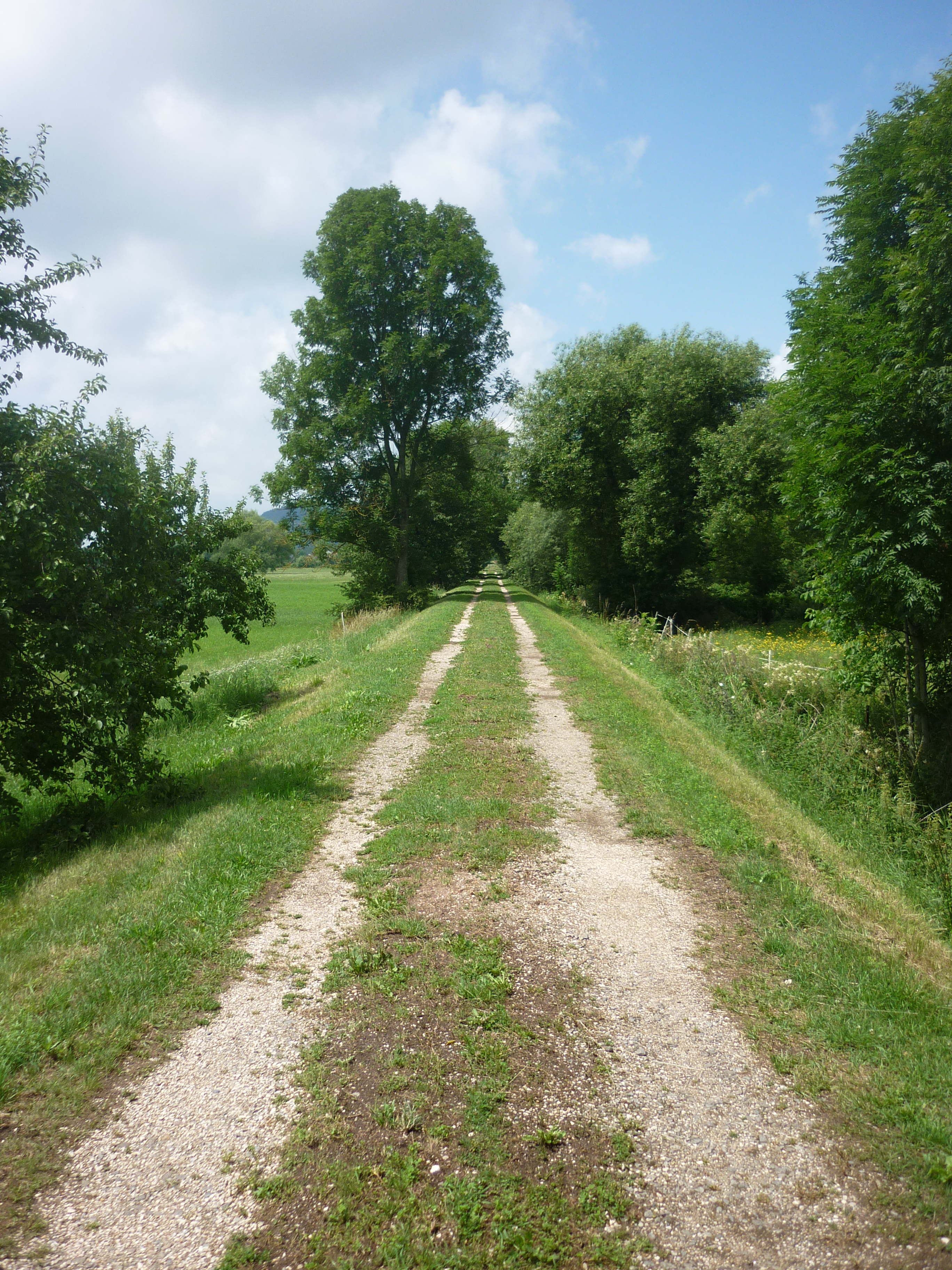 Walhallabahn Bahndamm bei Kruckenberg